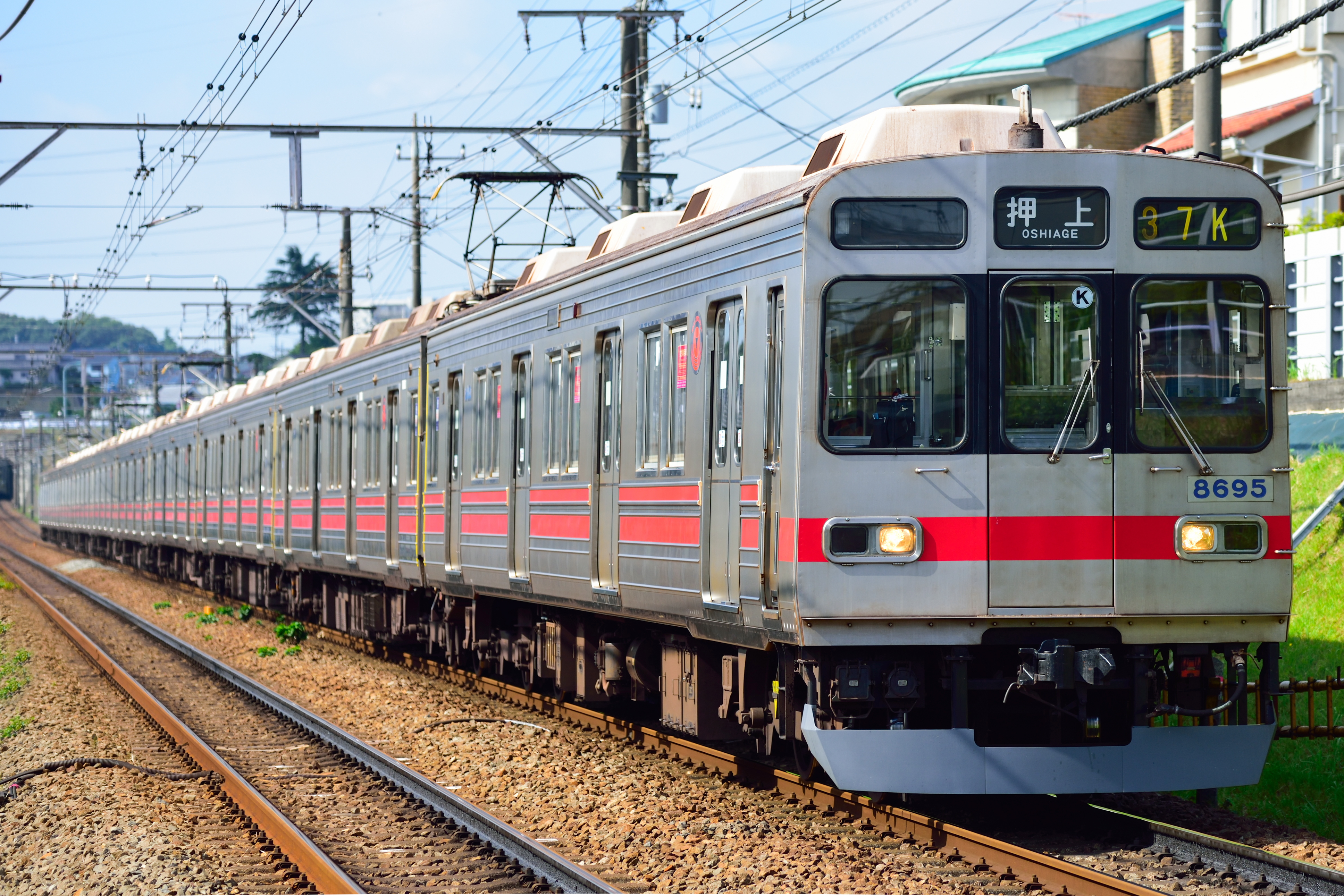 東急8590系（スカート装着）。つくし野駅。 Nikon D750